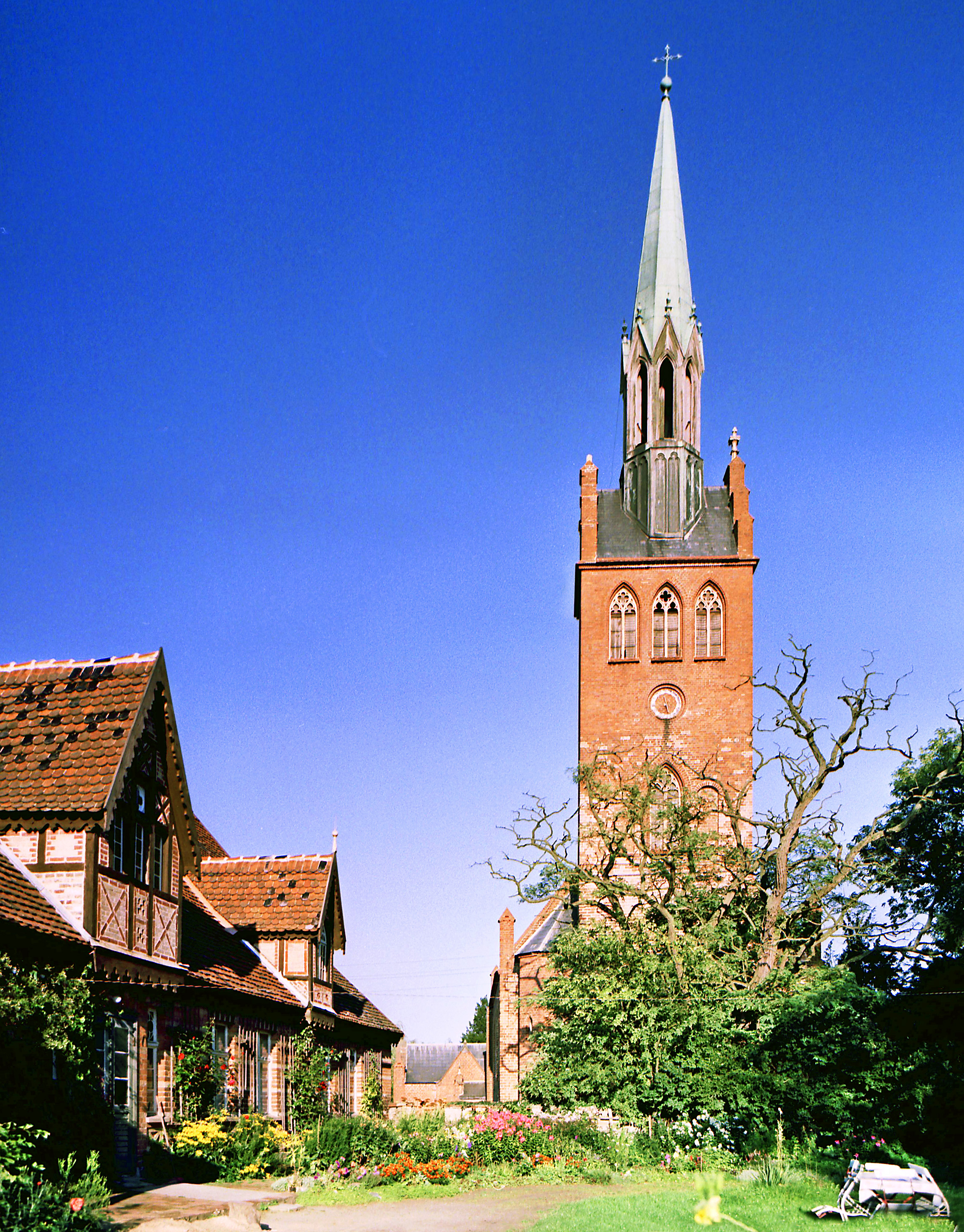 14.09.1987 2051 Basedow, Kirchsteig (GMP: 53.695917,12.878944): Gotische Dorfkirche (Chor 13. Jh., Langhaus 15, Jh.). Links das Pfarrhaus. [R19870914B06.jpg]19870914400NR.JPG(c)Blobelt